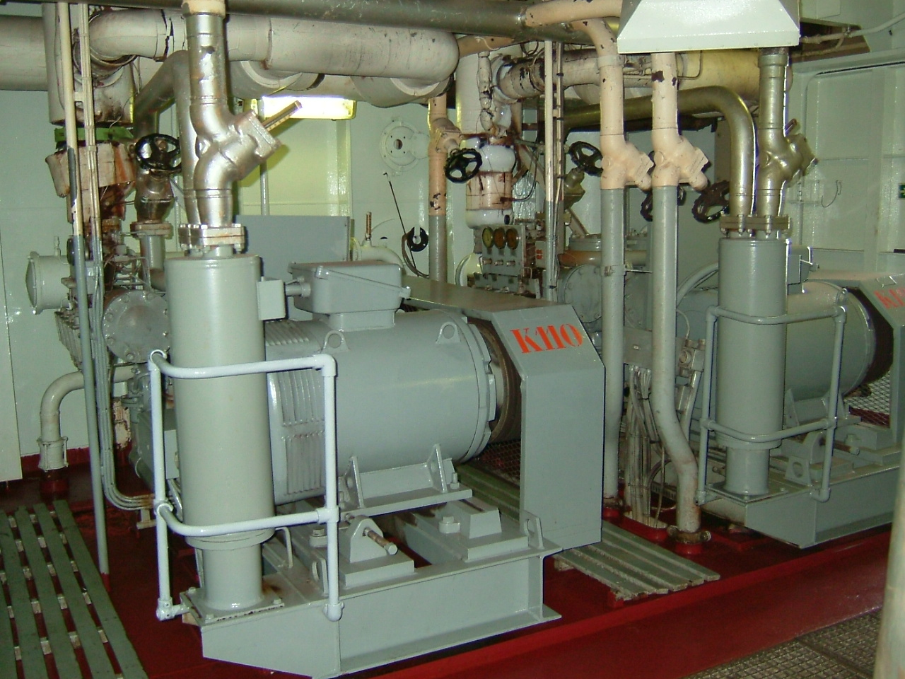 reefer compressors. compresseurs frigorifiques sur un navire.